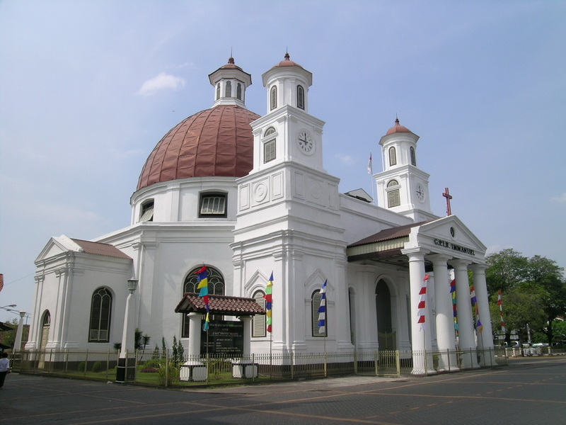 Blenduk Church, Semarang, Central Java, Indonesia